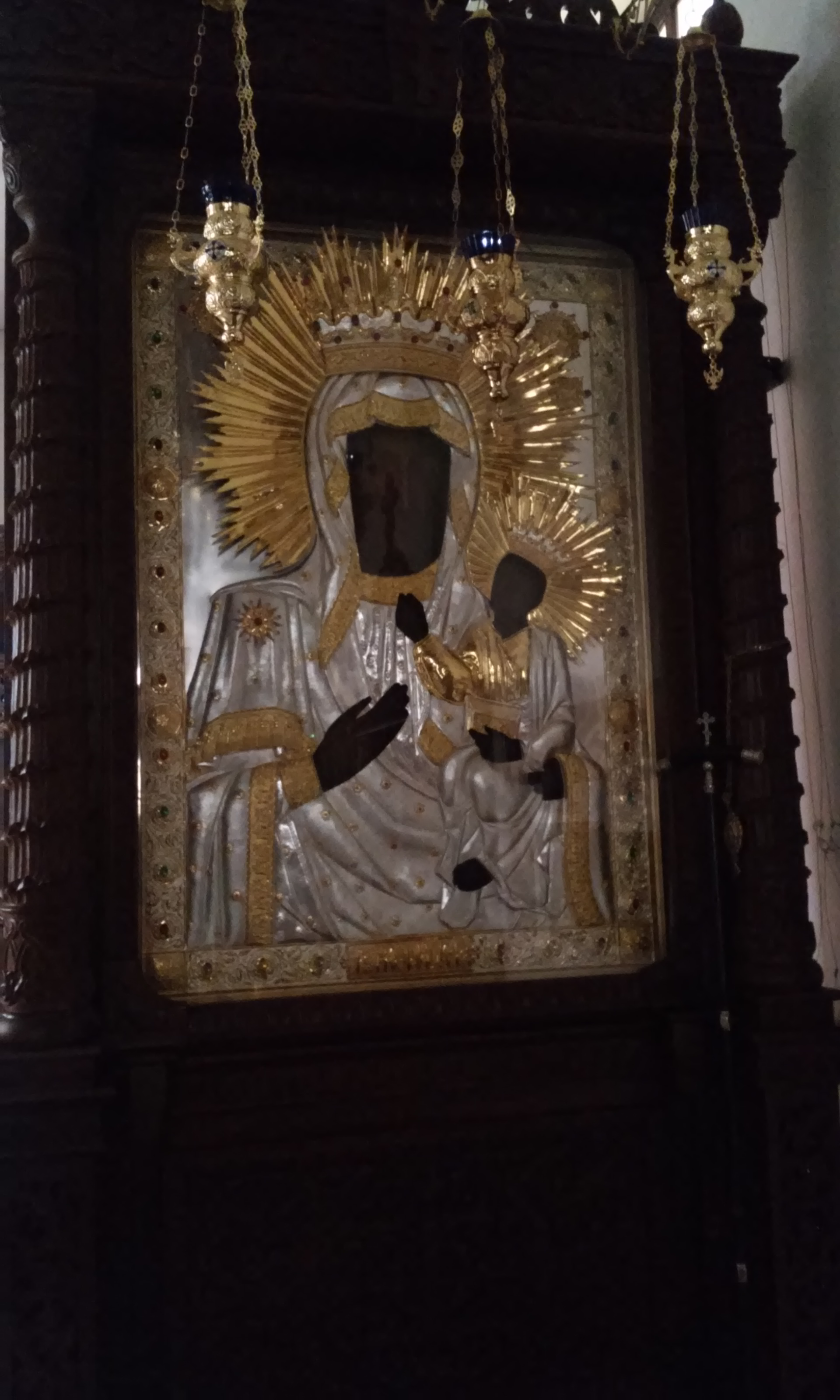 Turkowicka Ikona Matki Bożej w cerkwi monasteru w Turkowicach